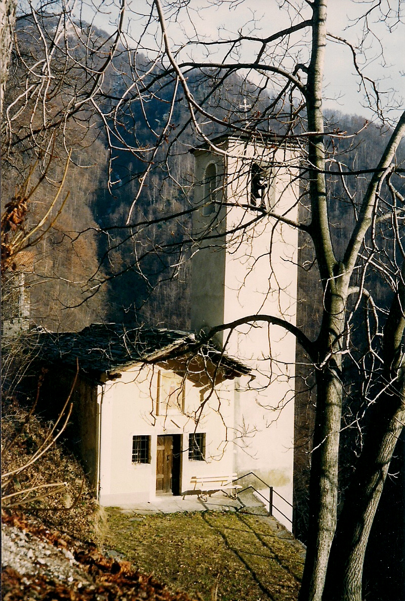 Chiesa dedicata a S. Gaudenzio, eretta nel 1610